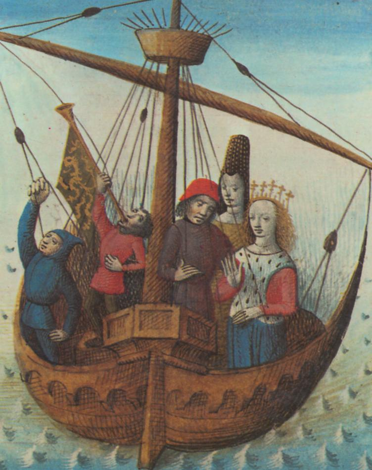 Tirée d'un manuscrit commandé par Jean du Mas, seigneur de l'Isle